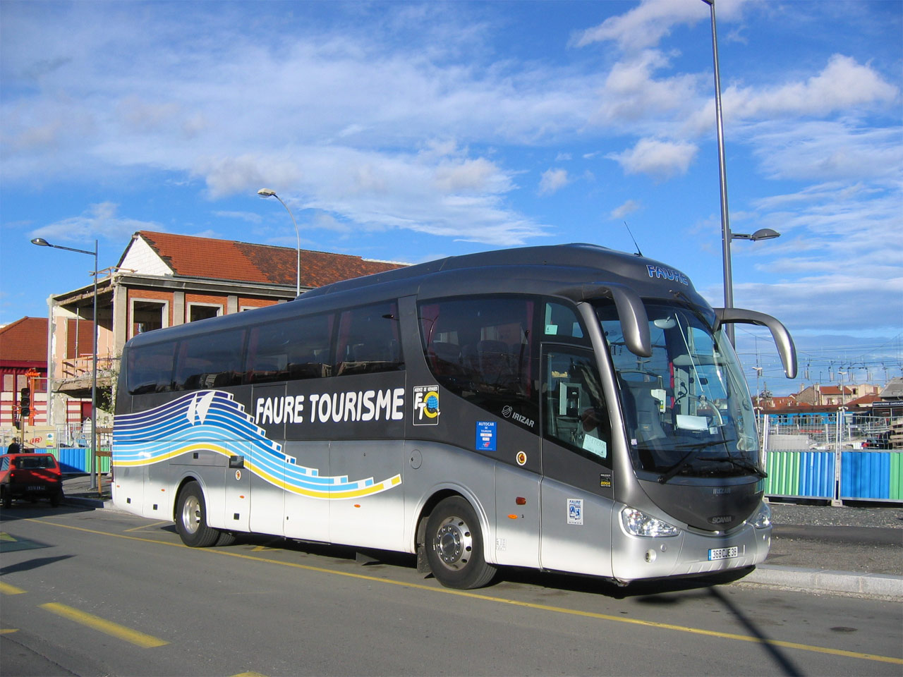 Autocar de tourisme Irizar PB